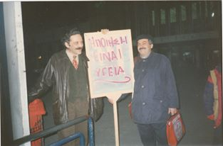 Ο Μανόλης Ξεξάκης με τον Μίμη Σουλιώτη σε εκδήλωση της Πολιτιστικής Πρωτεύουσας Θεσσαλονίκης 1997